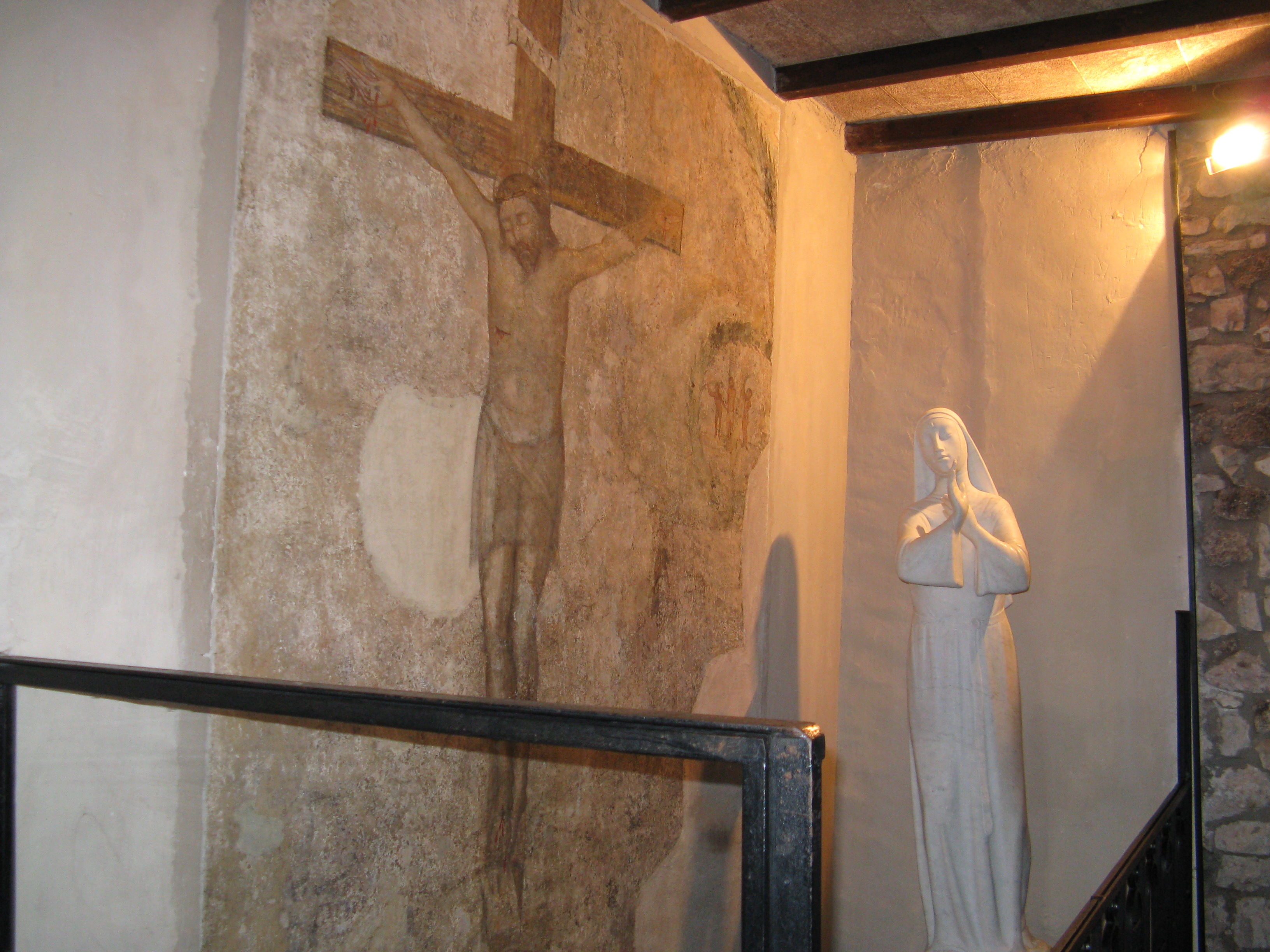 Crocifisso della Stimmata di Santa Rita